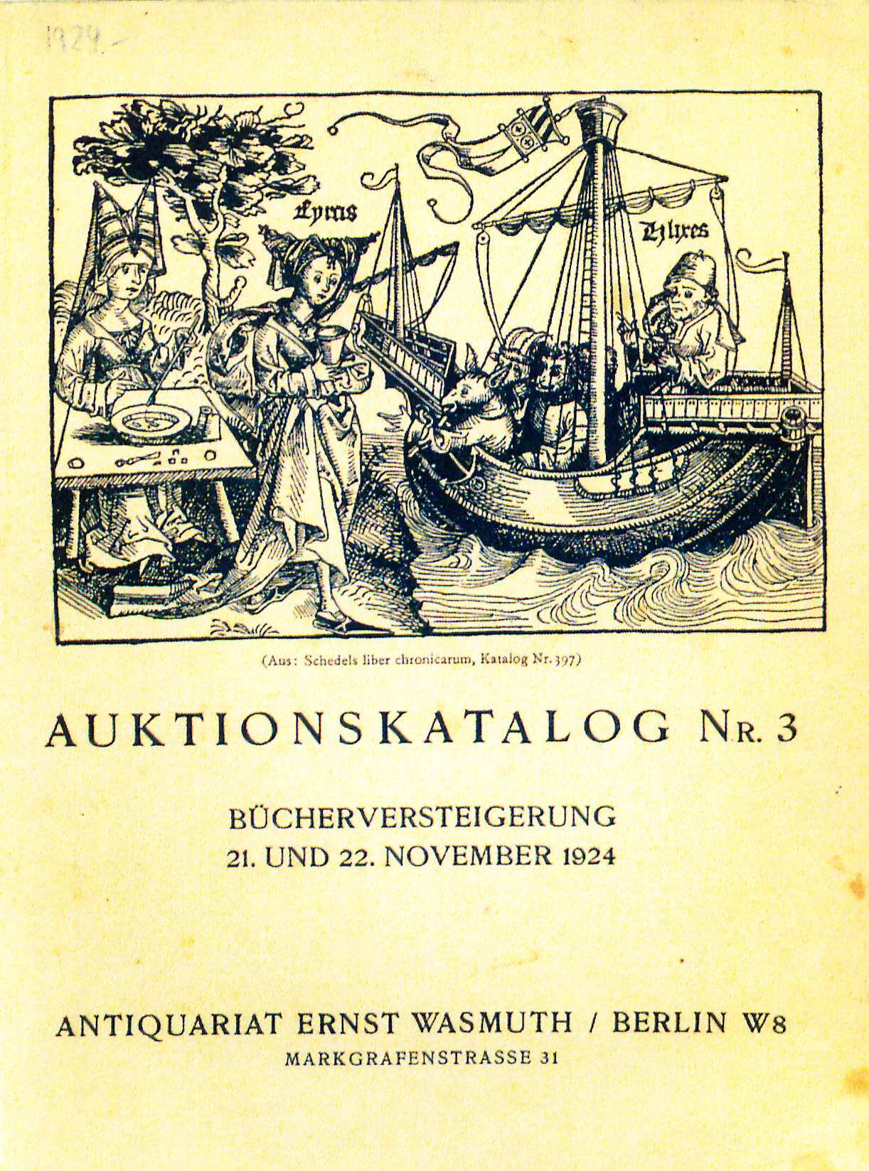 Ernst Wasmuth Verlag Auktionskatalog 1924 Bild aus Schedelsche Weltchronik